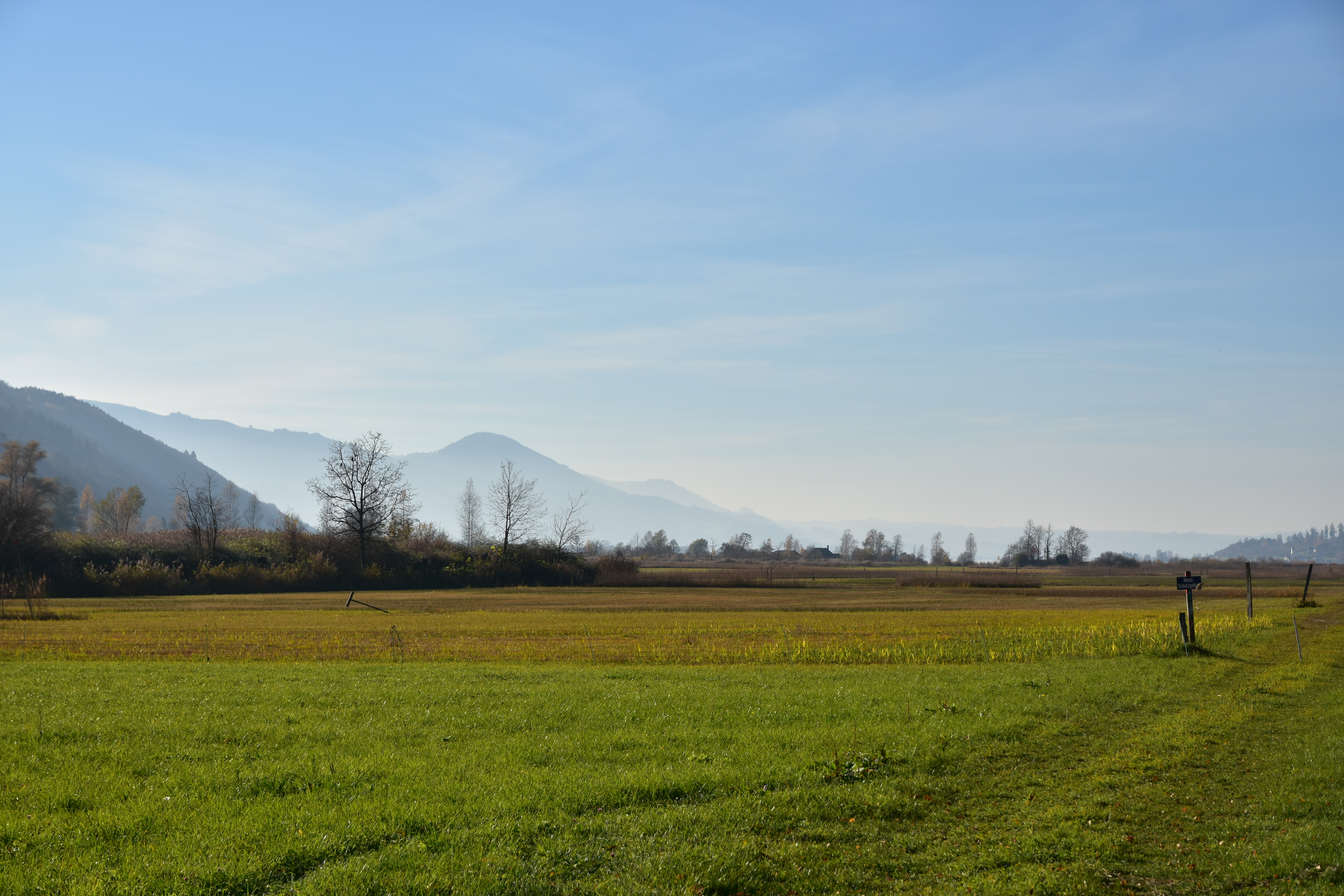 Schmerikoner Ried on Obersee lake shore (Switzerland)